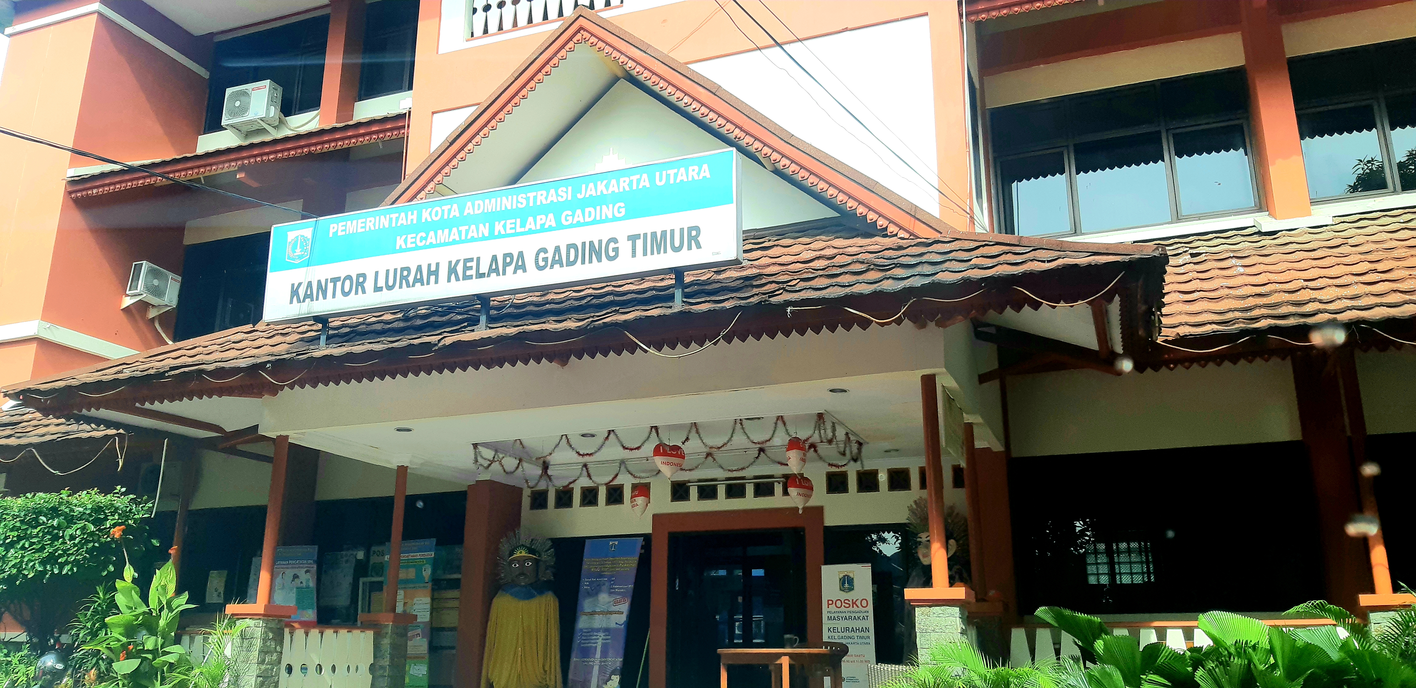 Kantor Lurah Kelapa Gading Timur, Kelapa Gading